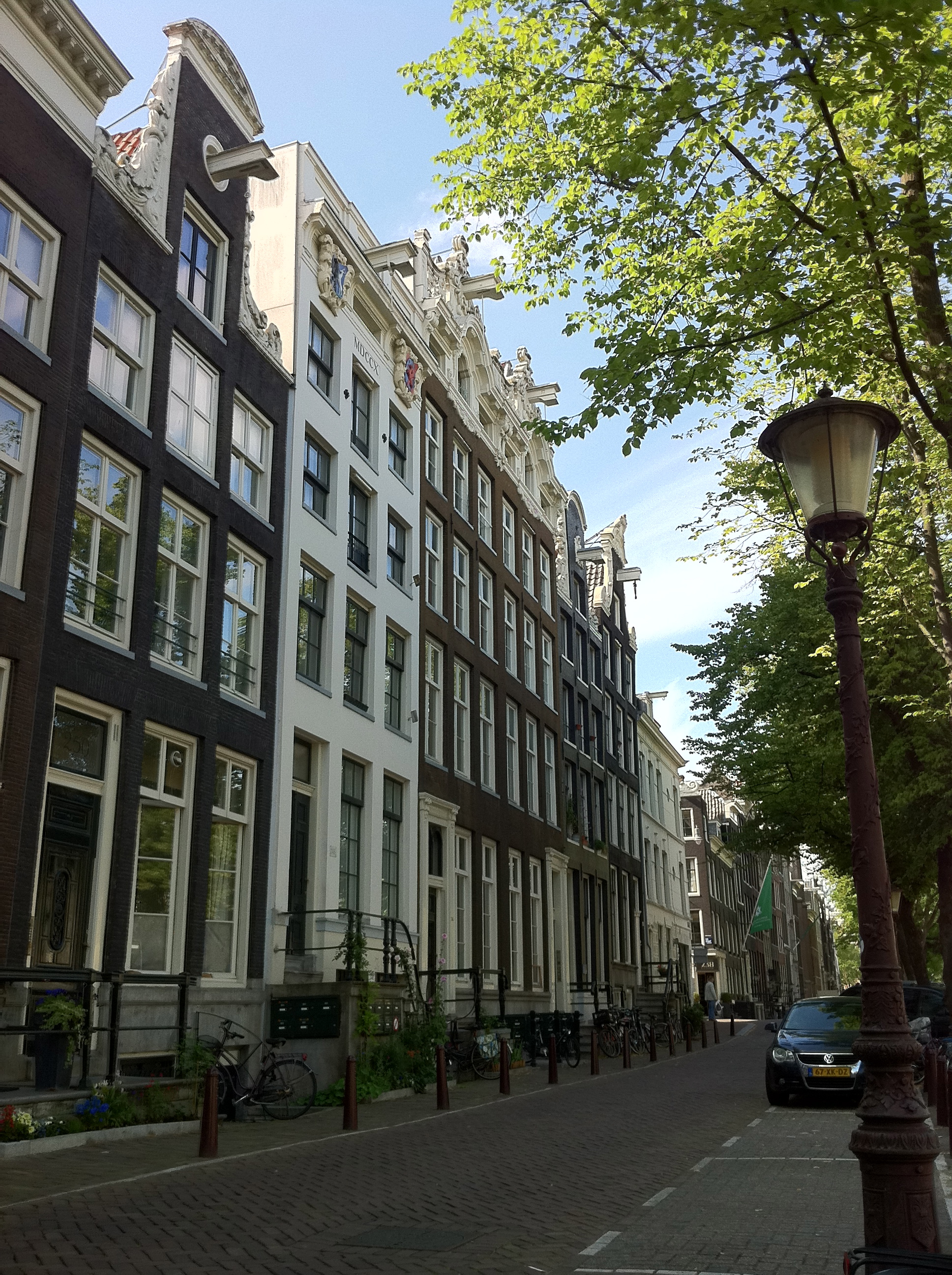 De Groote Keijser Keizersgracht 242-252 Amsterdam